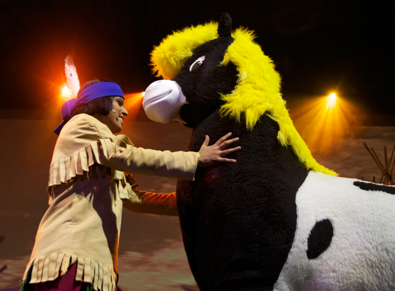 Szenenfoto aus dem Musical Yakari - Freunde fürs Leben: Yakari mit Kleiner Donner